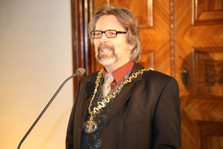 Gerald Bast-8626